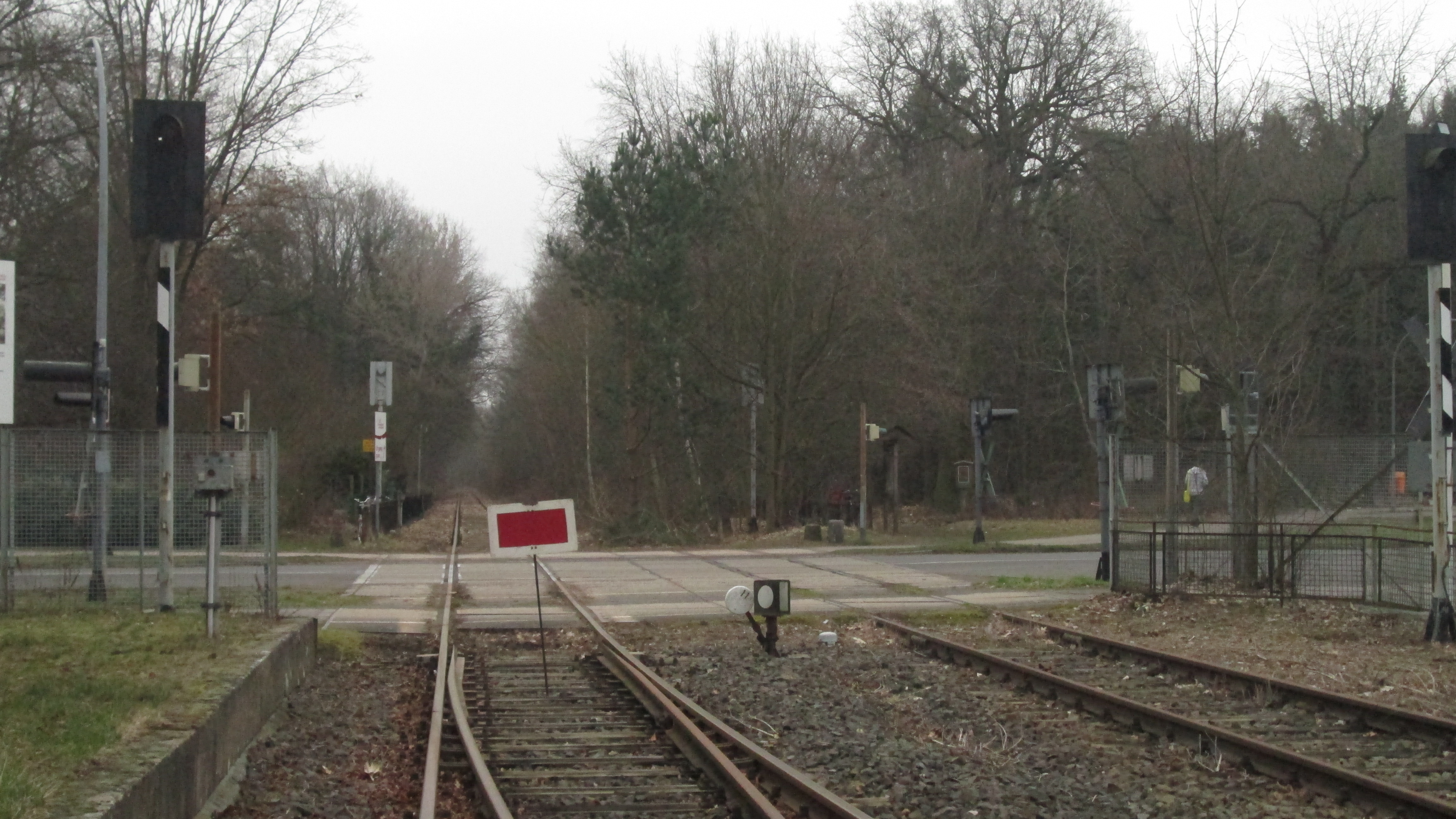 Heutiges Streckenende der Bahnstrecke Bötzow–Berlin-Spandau am Nordkopf des Bahnhofs Berlin-Spandau-Johannesstift